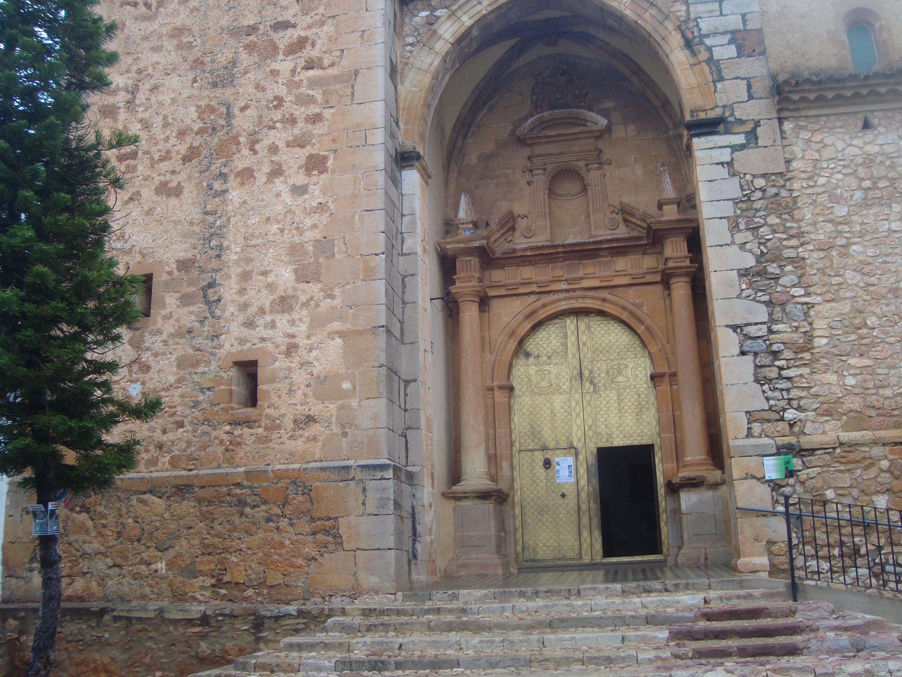 Església parroquial de l'Assumpció (Bell-lloc) 05.029-002.